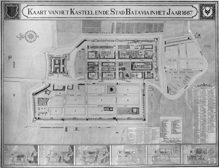 Negatief. plattegrond van de stad en het kasteel Batavia in het jaar 1667. Kaart van het Kasteel en de stad Batavia in het jaar 1667